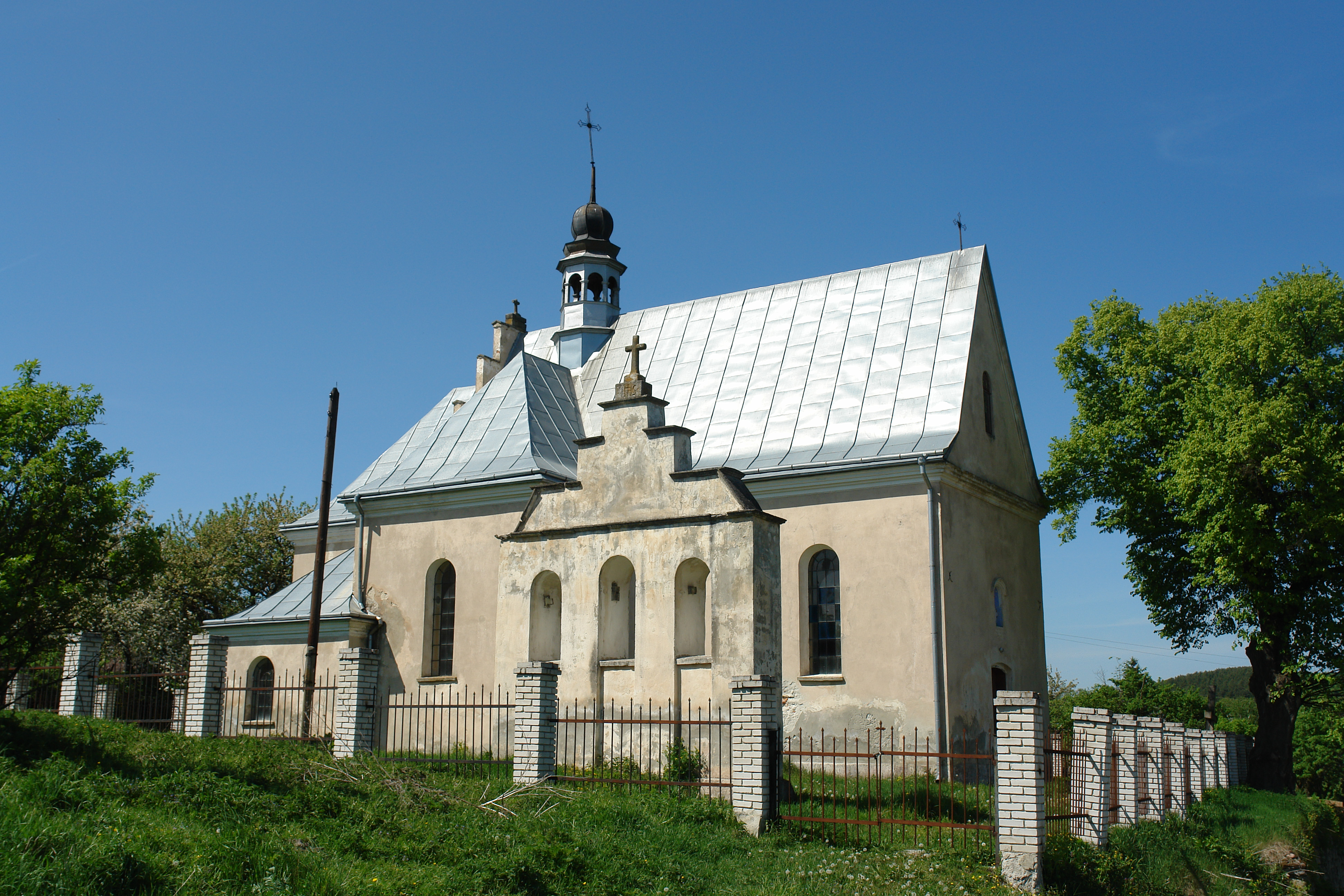 Каплиця Відвідин Найсвятішої Діви Марії Святої Єлизавети, с.Тучне Перемишлянського району